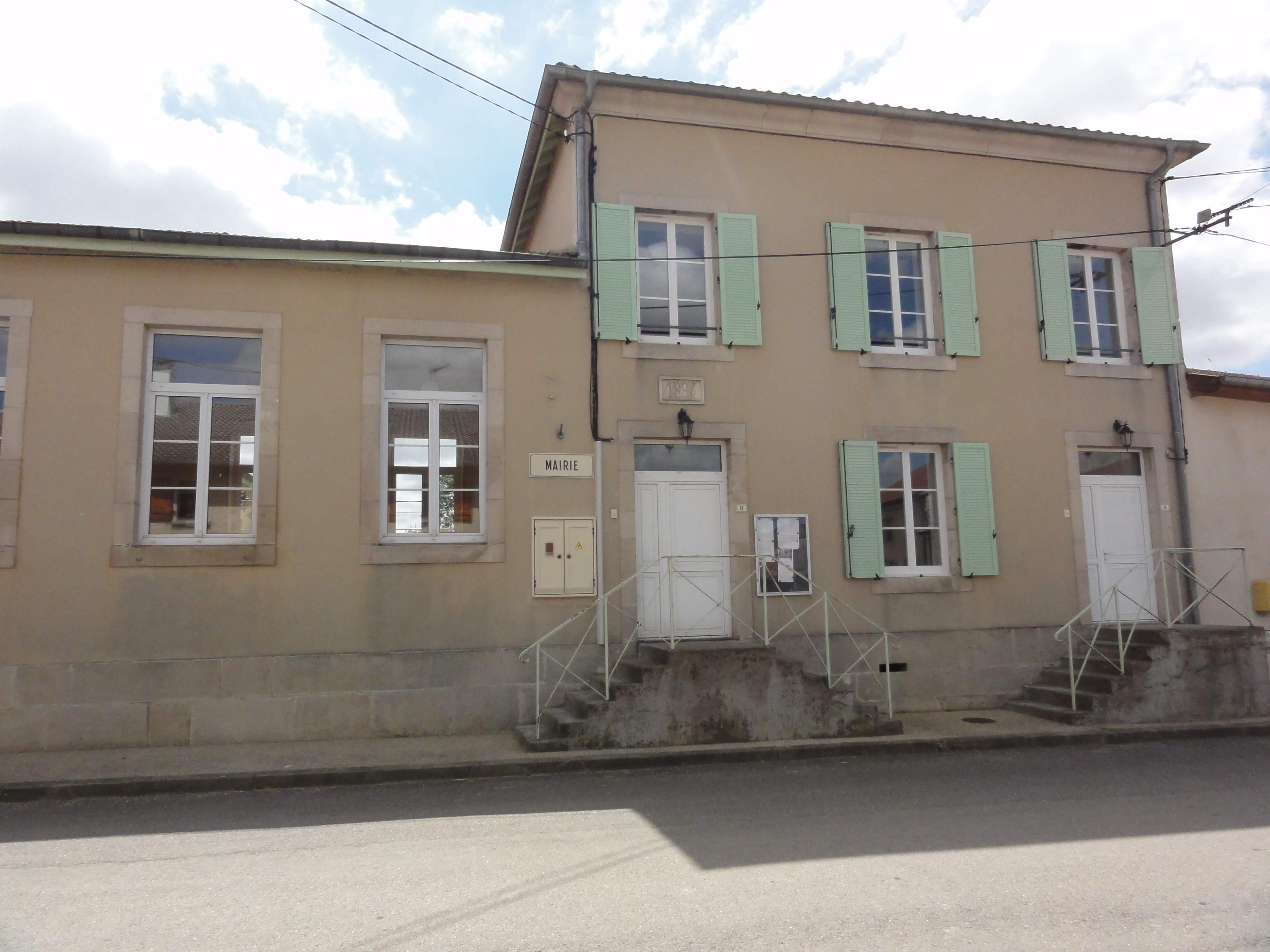 Baudrémont (Meuse) mairie